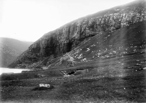 Lake Leynavatn, Faroe Islands